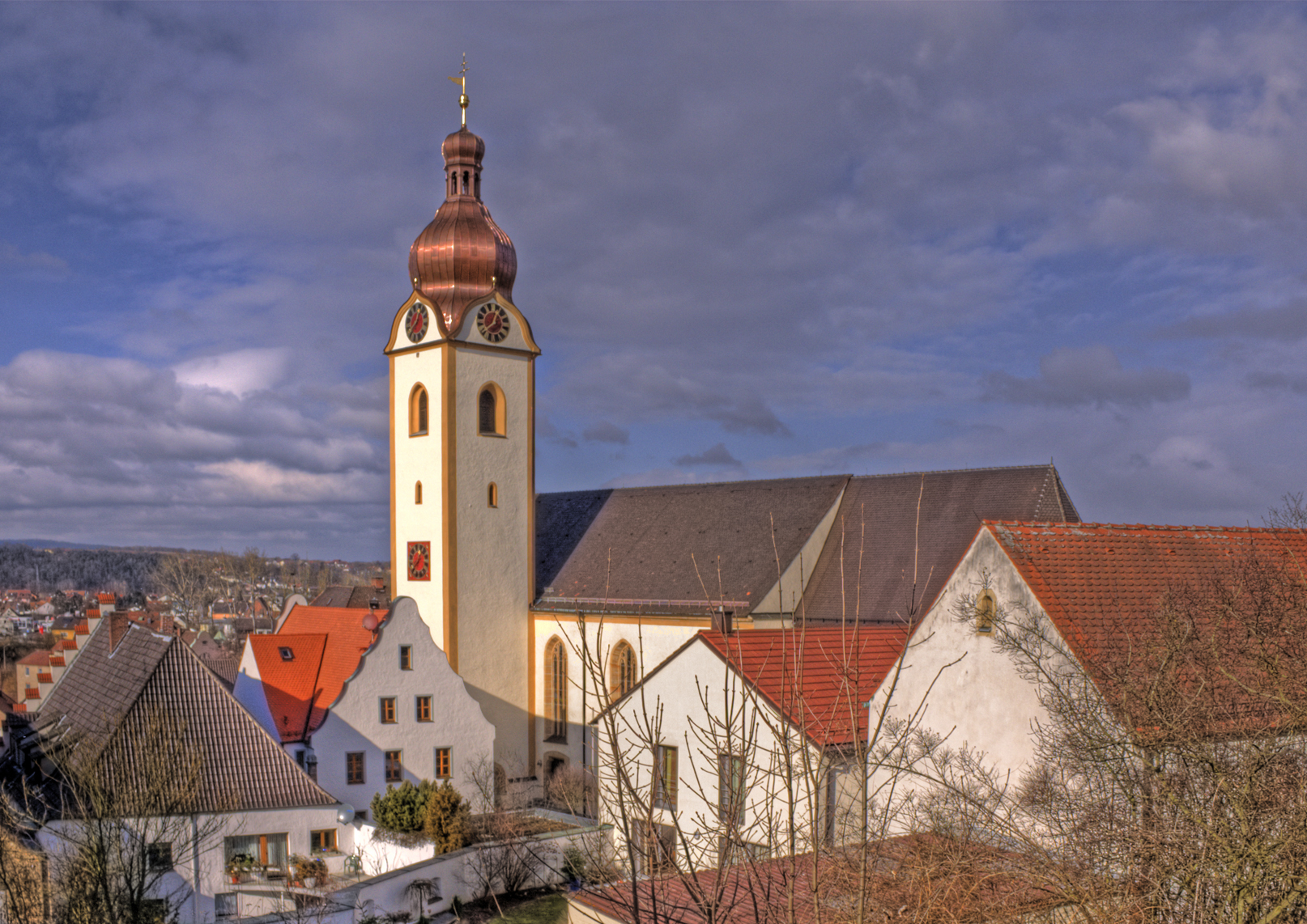 Kirche St. Jakob in Schwandorf von der Blasturmgasse aus fotografiert